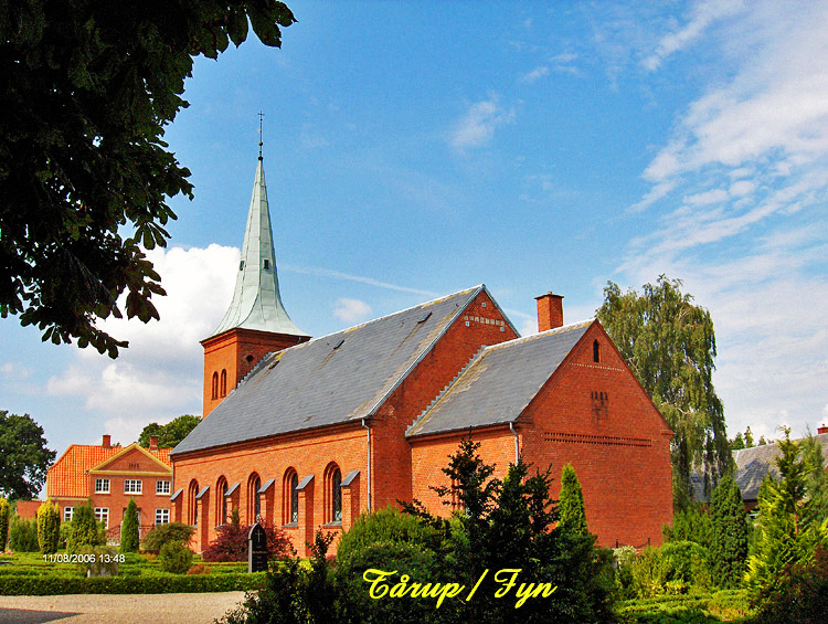 fra sydøst